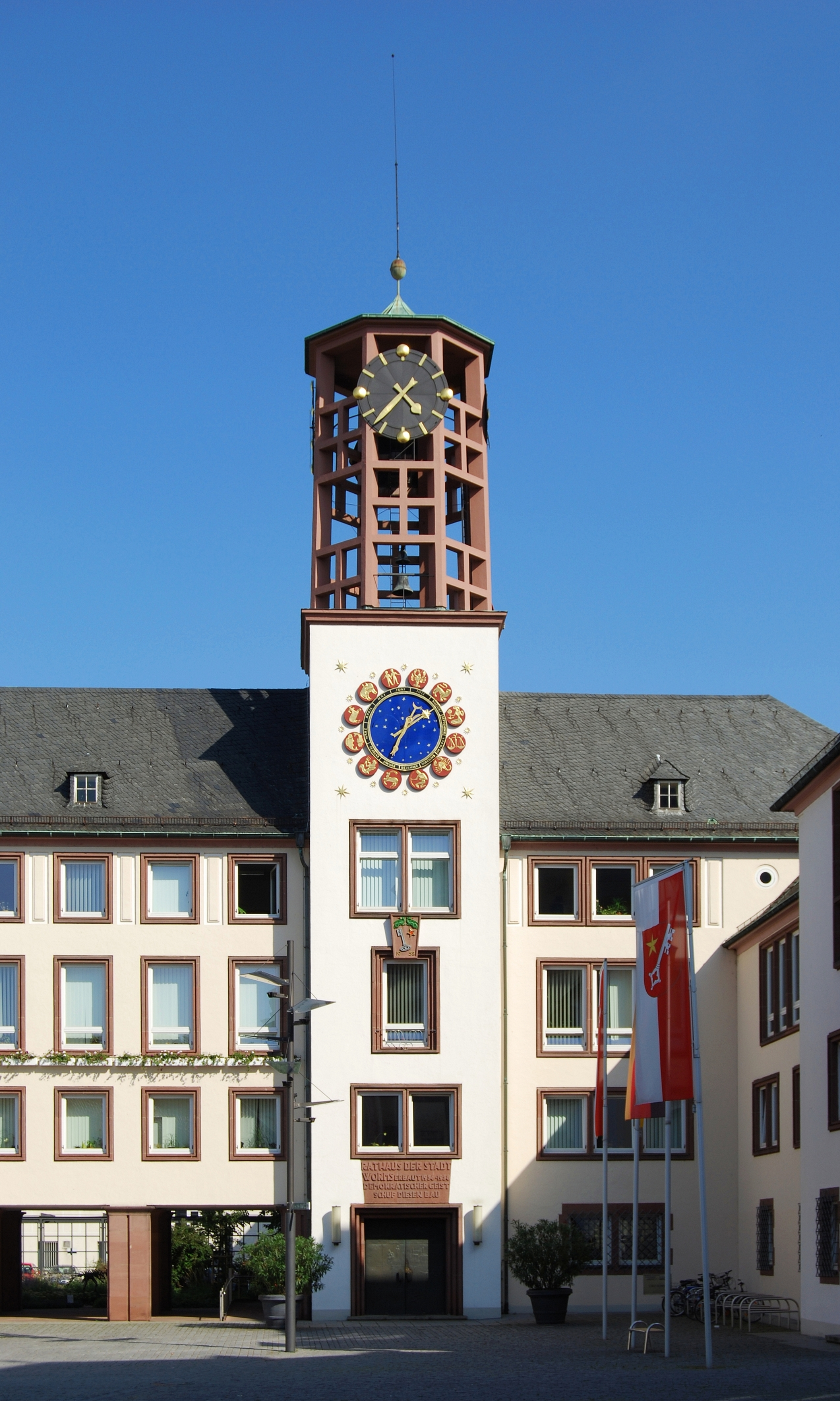 Der Turm des Wormser Rathauses im August 2009.